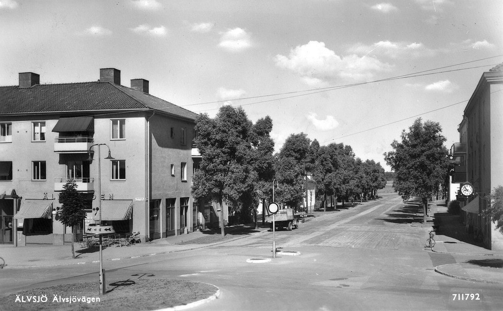 Älvsjövägen vid rondellen Johan Skyttes väg, vy mot norr